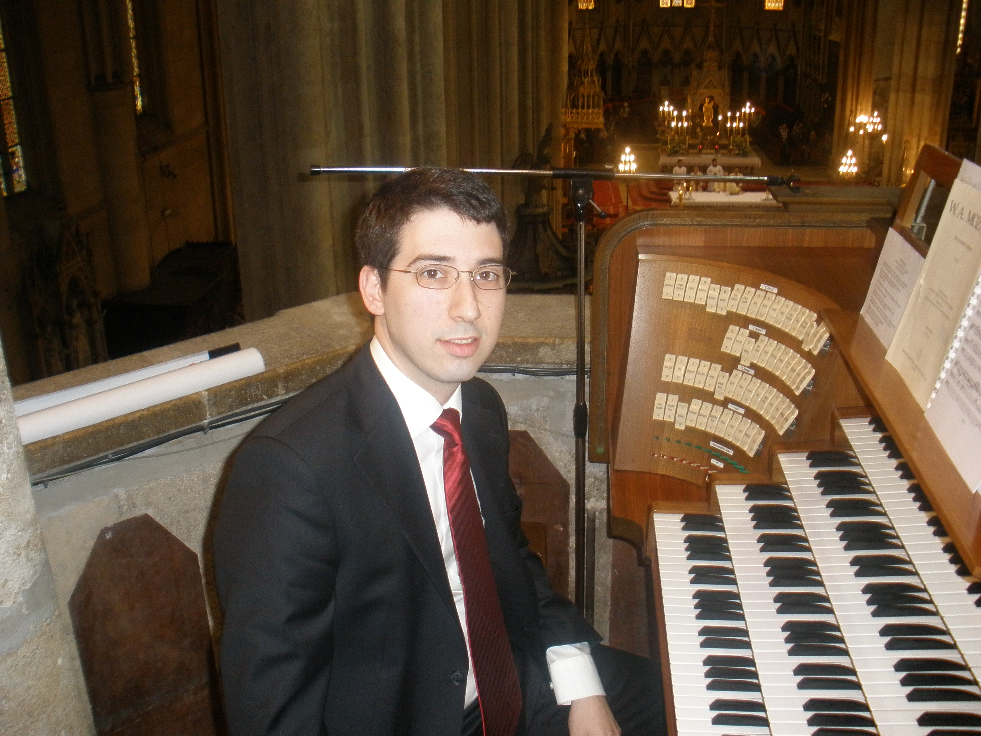 Pavao Mašić